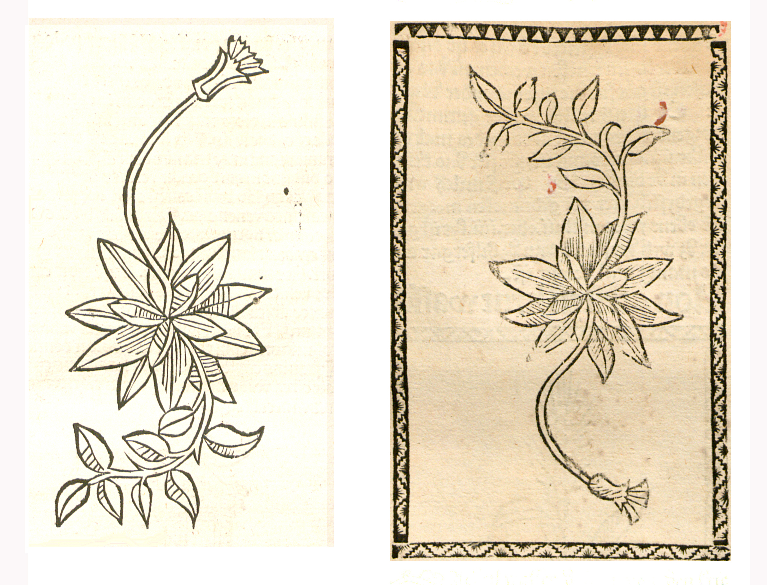 Abbildung von Gaucheil (Anagallis arvensis)